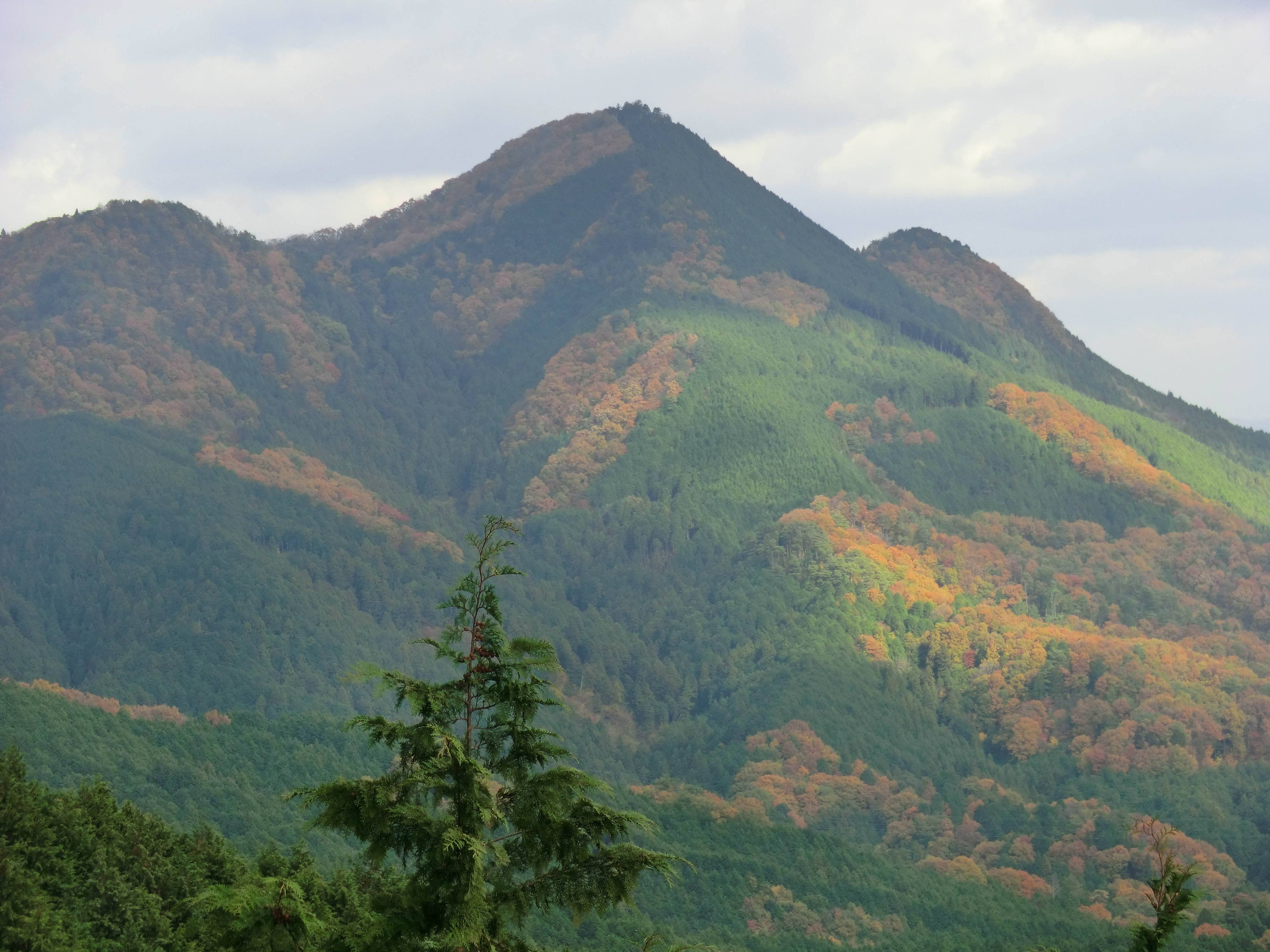 額井岳（鳥見山公園展望台より）